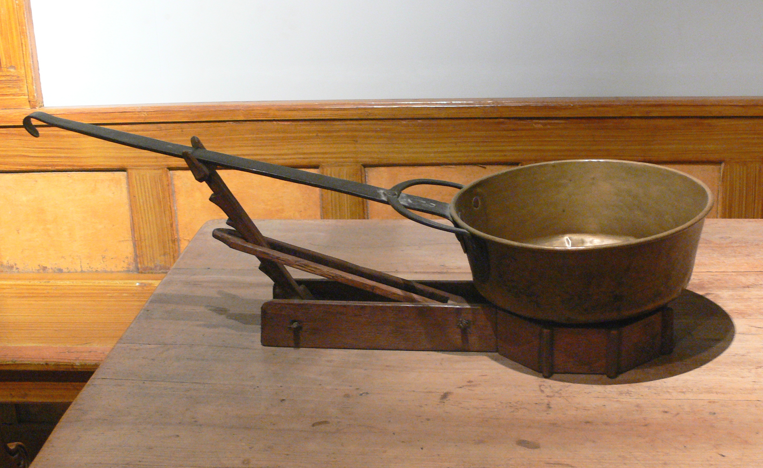 Pfannenknecht, Eiche; aus Stetten im Remstal; um 1750–1850 Landesmuseum Württemberg (Außenstelle: Museum für Volkskultur Waldenbuch), 1.4 Inv. Nr. VK 1988/457